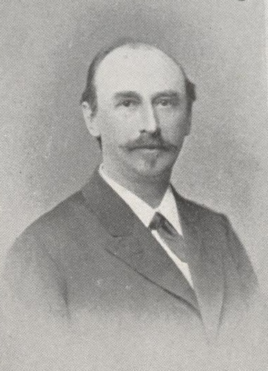 Karl Wasserrab, Professor der Wirtschaftslehre München, Sozialreformer